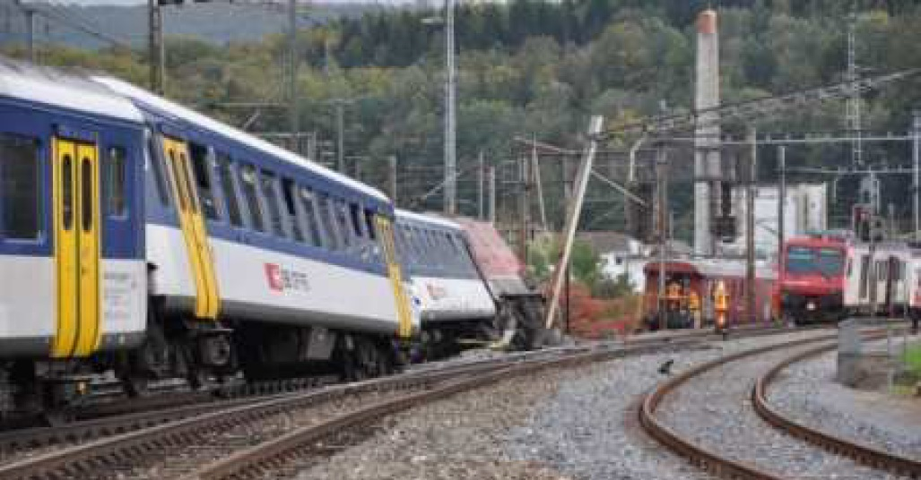 Kollision von zwei Reisezügen am Donnerstag, 6. Oktober 2011 in Olten. Links Zug Zug Nr. 17075 mit Re 420 11184, B 20-35217-2, B 20-35006-9 und AB 39-35068-8, rechts Zug Nr. 17937 mit RBDe 561 171-0.